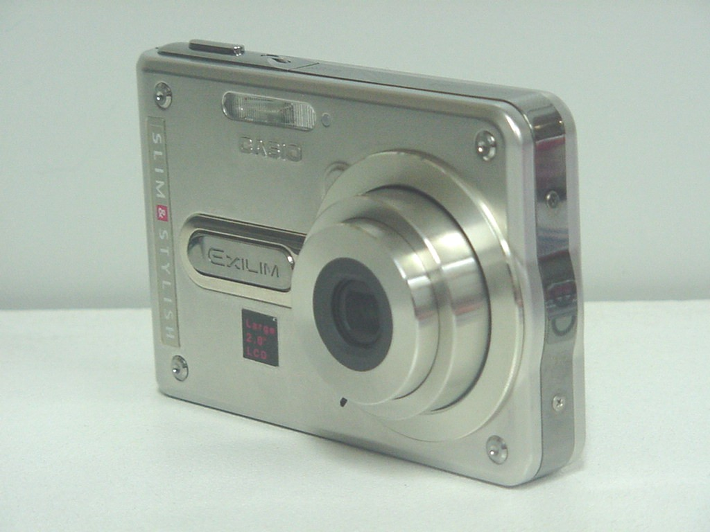 Appareil photographique numérique Casio Exilim EX-S100 - Vue générale